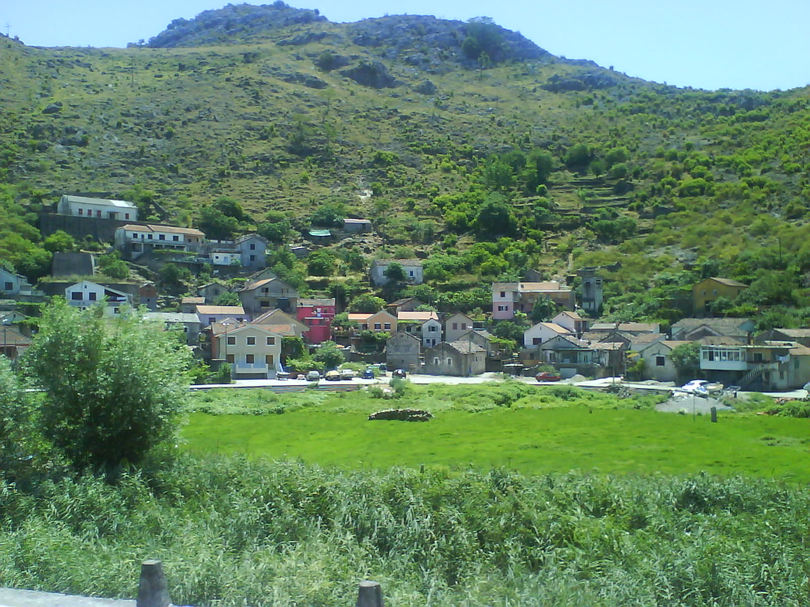 Vranjina